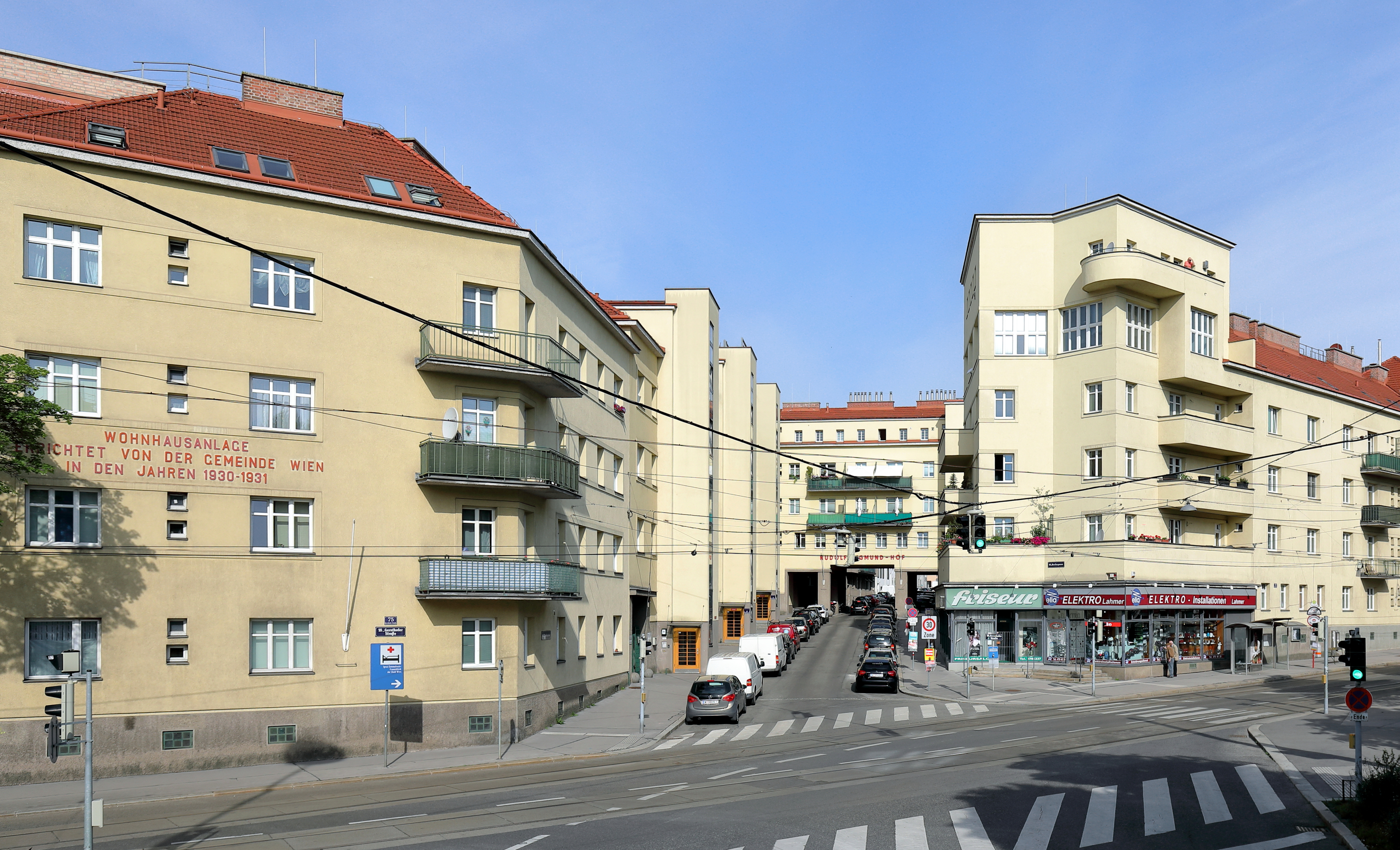 Die Ostansicht des Gemeindebaus „Rudolf-Sigmund-Hof“ an der Adresse Gersthofer Straße 75-77 im 18. Wiener Gemeindebezirk Währing. Die städtische Wohnhausanlage mit rd. 270 Wohneinheiten wurde von 1930 bis 1931 nach Plänen der Architekten Wilhelm Schön und Karl Schön errichtet und im Zuge einer Generalsanierung Ende 2007 nach dem sozialdemokratischen Kommunalpolitiker Rudolf Sigmund benannt.